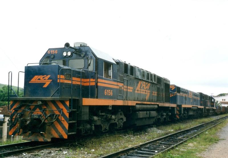 Locomotiva EMAQ/CAF, produzida sob licensa da MLW-ALCo, tipo MX620 #6156 da FCA, no pátio de Andrelândia, MG.